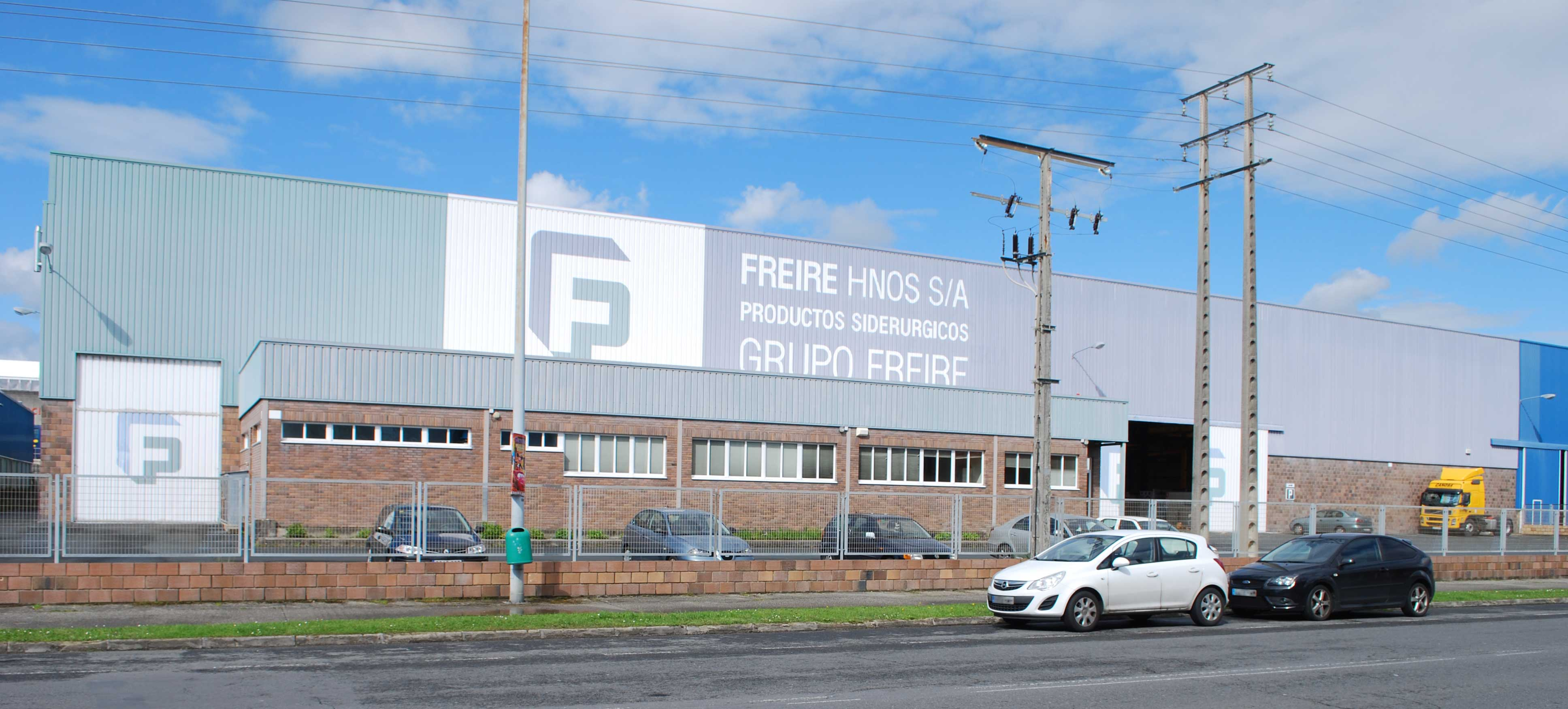 Freire Hermanos no polígono da Gándara Narón A Coruña Galiza Spain